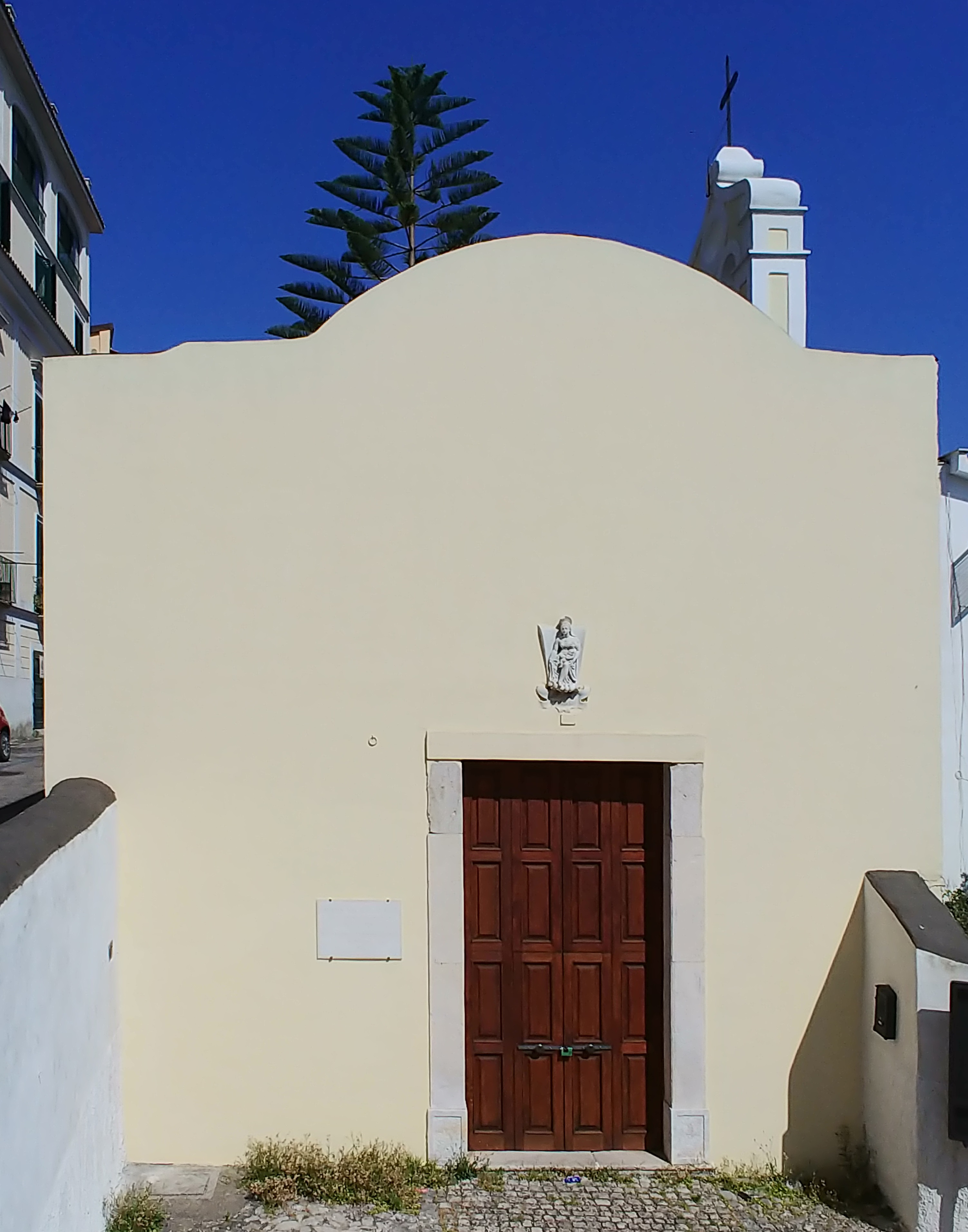 Facciata.